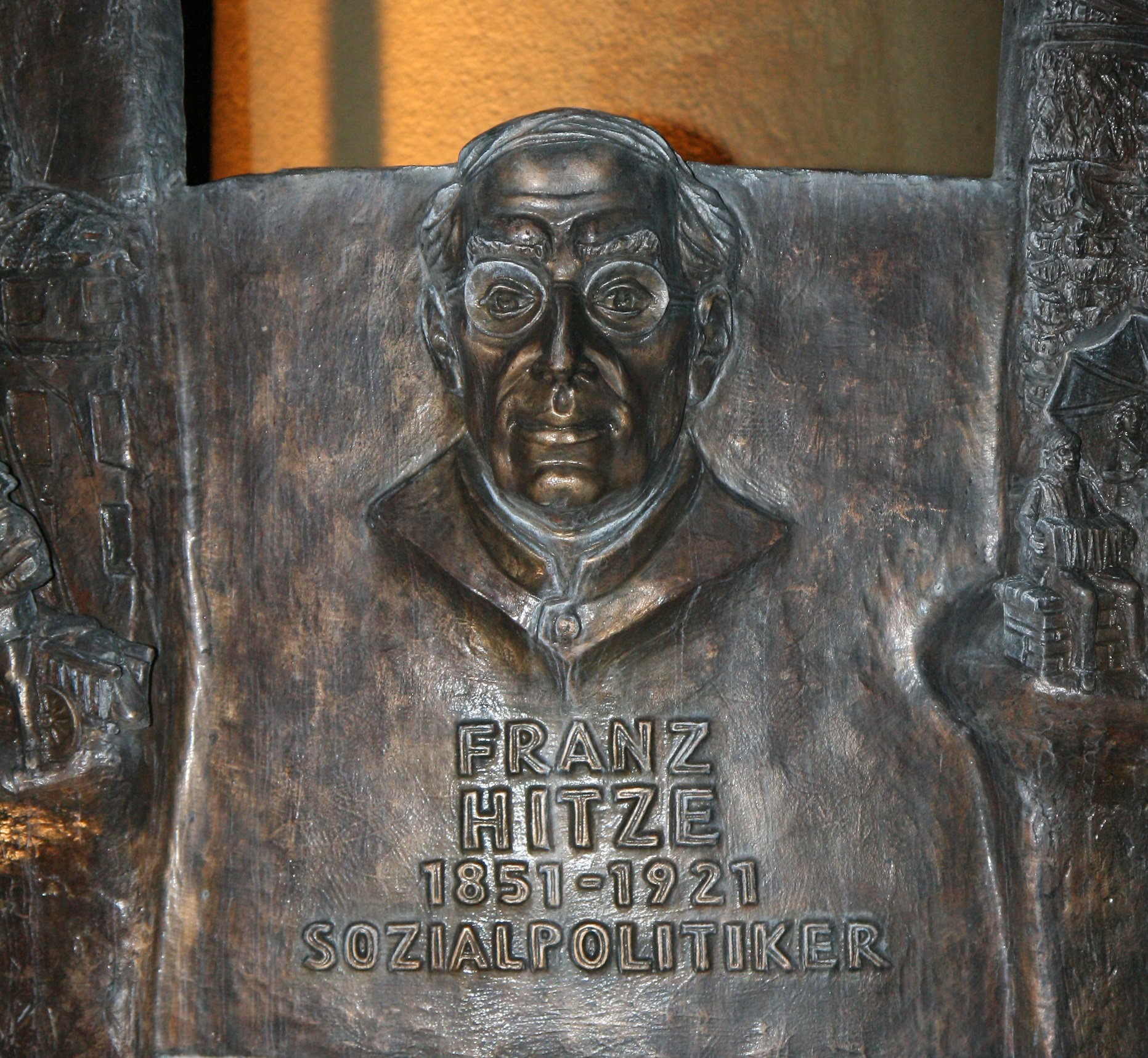 Geschichtsbrunnen am Kurkölner Platz in Olpe. Relief Franz Hitze.